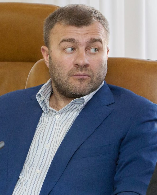 Михаил Евгеньевич Пореченков (род. 1969) — российский актёр театра и кино